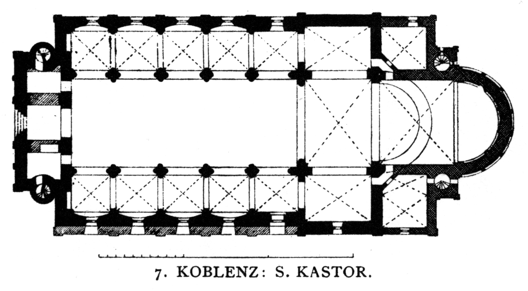 Koblenz, St. Kastor, floor plan.